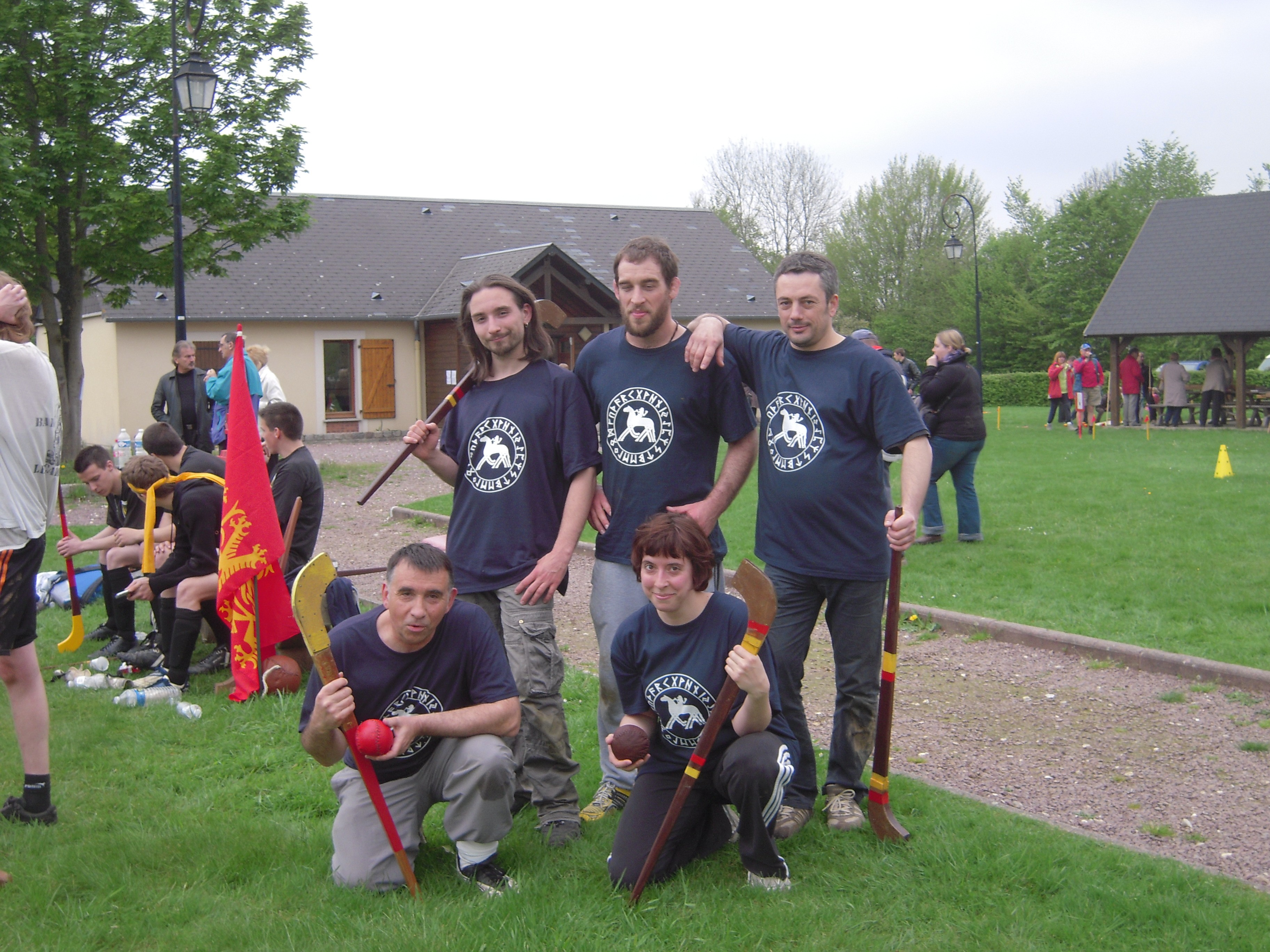 équipe des expatriés (Exo Nourmaundie Choule)